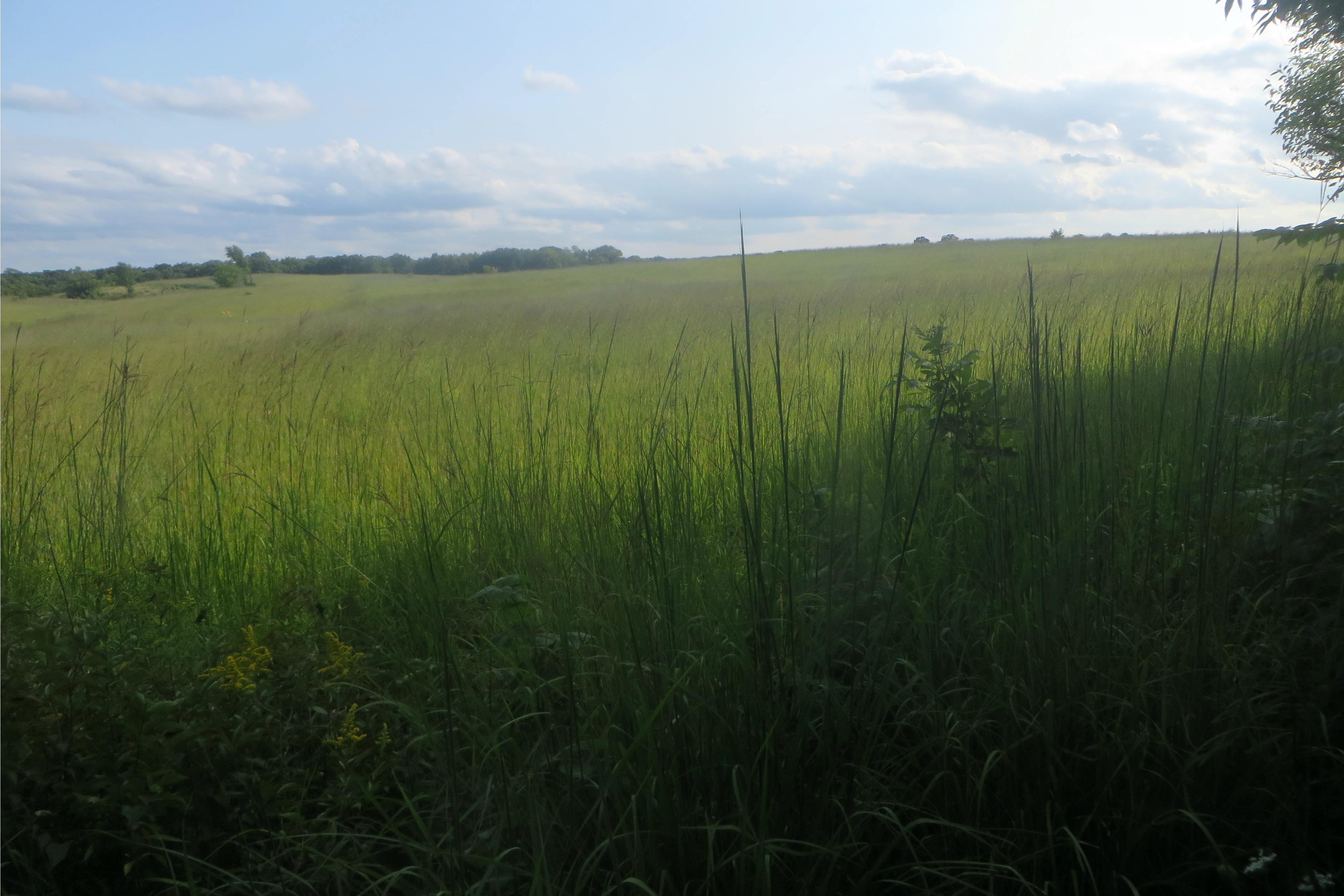 Prairie